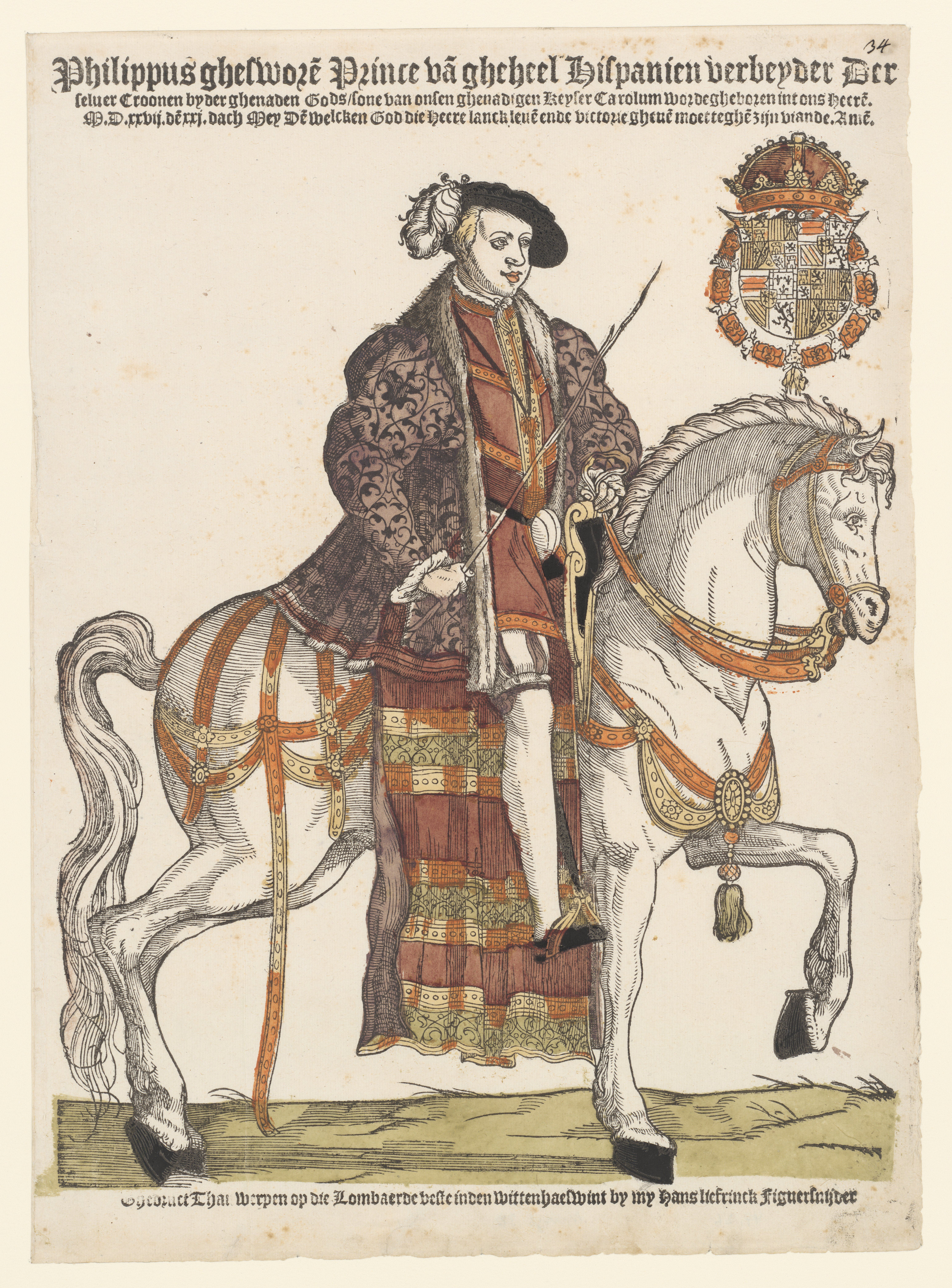 IdentificatieTitel(s): Portret van Filips II te paardObjecttype: prent Objectnummer: RP-P-1932-154Catalogusreferentie: Hollstein Dutch 39-afterOpschriften / Merken: adres, recto midden onder, gedrukt: ‘Ghedruct Thantwerpen op die Lombaerde veste inden witten haeswint by my Hans Liefrinck Figuersnijder’opschrift, recto middenboven, gedrukt: ‘Philippus gheswore[n] Prince...zijn viande. Ame[n]’nummer, recto rechtsboven, handgeschreven: ‘34’ (Gotha nummering)Omschrijving: Filips II in Spaanse kledij op een stappend paard, het wapen van Karel V met de keizreskroon rechtsboven.VervaardigingVervaardiger: prentmaker: Cornelis Anthonisz. (manier van)prentmaker: Hans Liefrinck (I)bloksnijder: Hans Liefrinck (I) (mogelijk)uitgever: Hans Liefrinck (I) (vermeld op object)Plaats vervaardiging: bloksnijder: Nederlandenuitgever: AntwerpenDatering: 1542 - 1543Fysieke kenmerken: houtsnede, handgekleurd in rood, oranje, geel, groen, bruin en zwartMateriaal: papier Techniek: houtsnede / met de hand kleurenAfmetingen: blad: h 405 mm × b 294 mmOnderwerpWat: historical person (PHILIP II, KING OF SPAIN) - historical person (PHILIP II, KING OF SPAIN) portrayed aloneequestrian state-portraitWie: Filips II (koning van Spanje)Verwerving en rechtenCredit line: Aankoop met steun van de Vereniging RembrandtVerwerving: aankoop mei-1932Copyright: Publiek domein